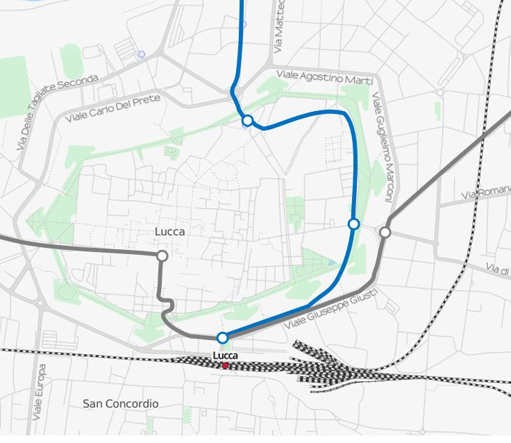 Percorso urbano delle tranvie Lucchesi